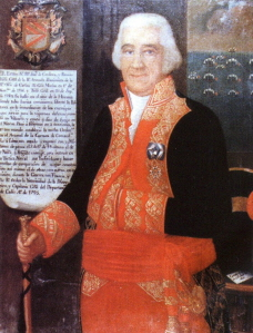 Retrato del marino español José de Córdova y Ramos (1732-1815), que llegó a ser teniente general de la Real Armada Española y fue derrotado por los ingleses en la Batalla del Cabo de San Vicente, librada en 1797, por lo que fue degradado.